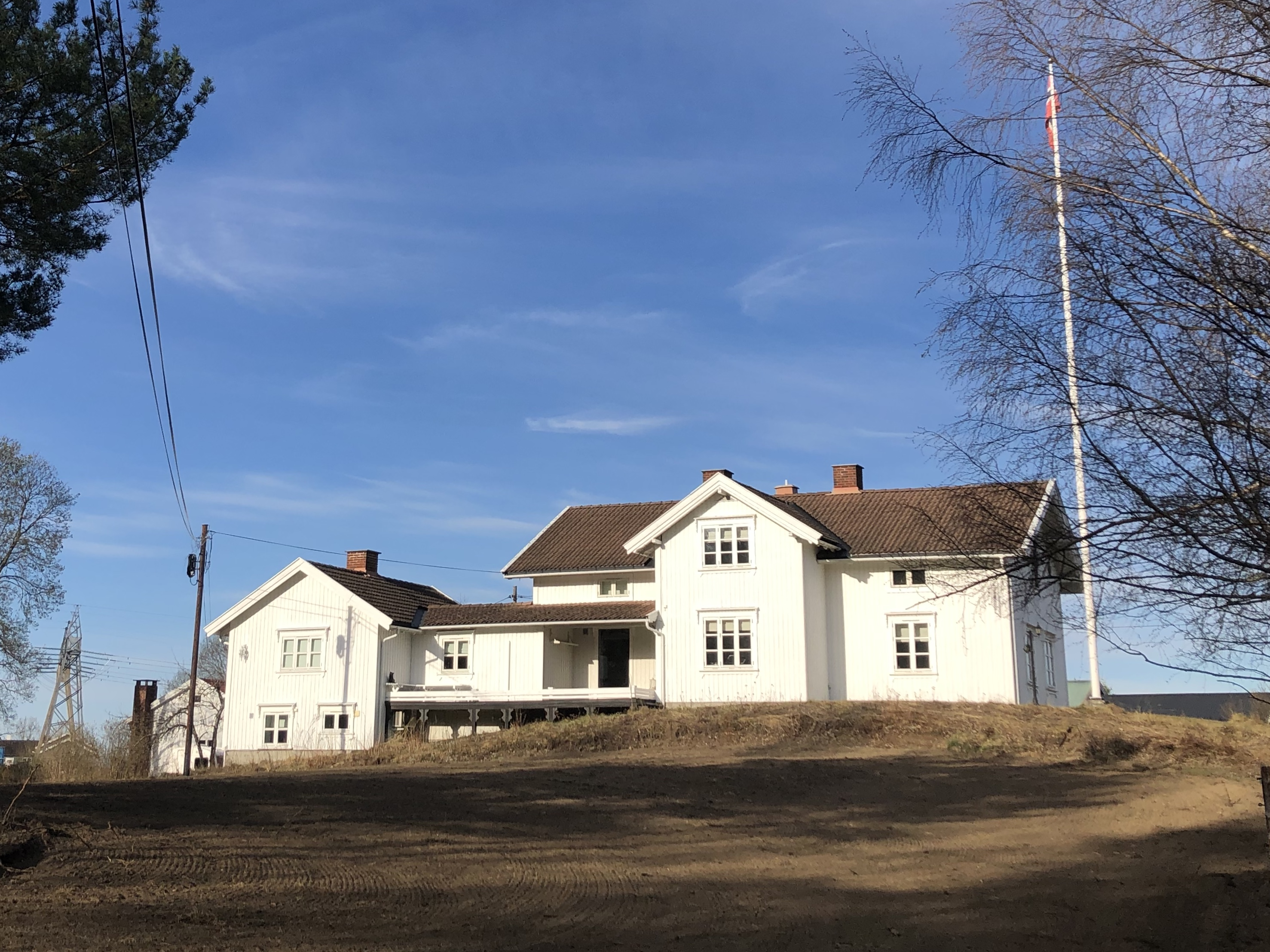 Nedre Klekken gård, Øvre Klekkenvei 30, Ringerike